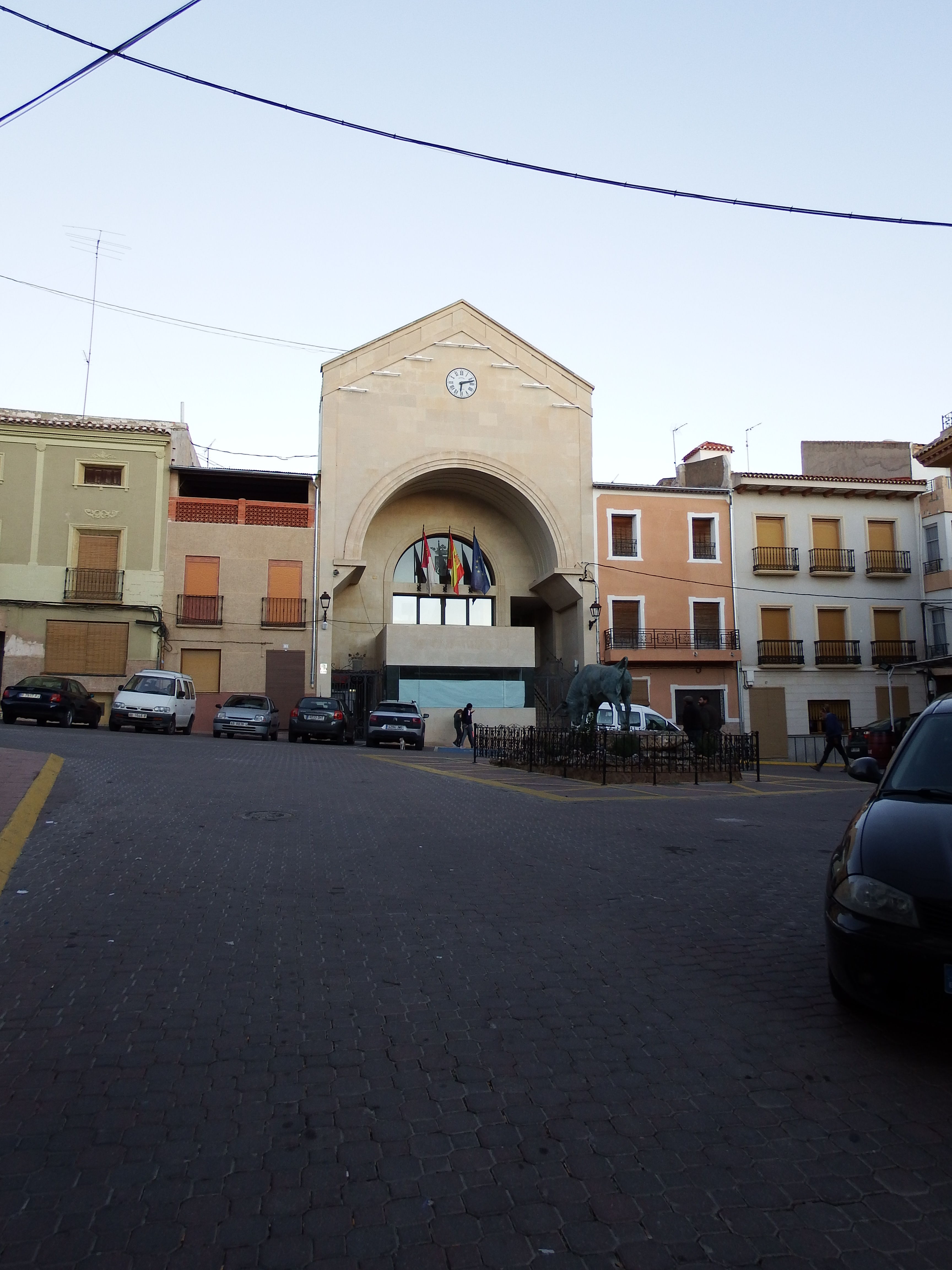 Ontur